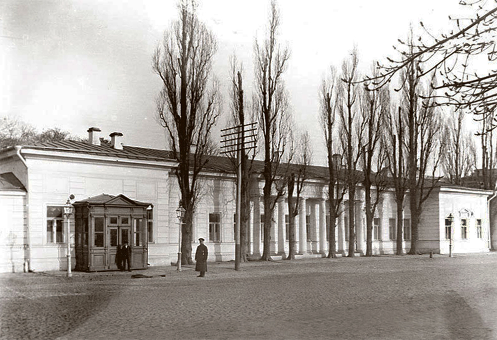 Будинок цивільного губернатора. Липська вулиця. Київ